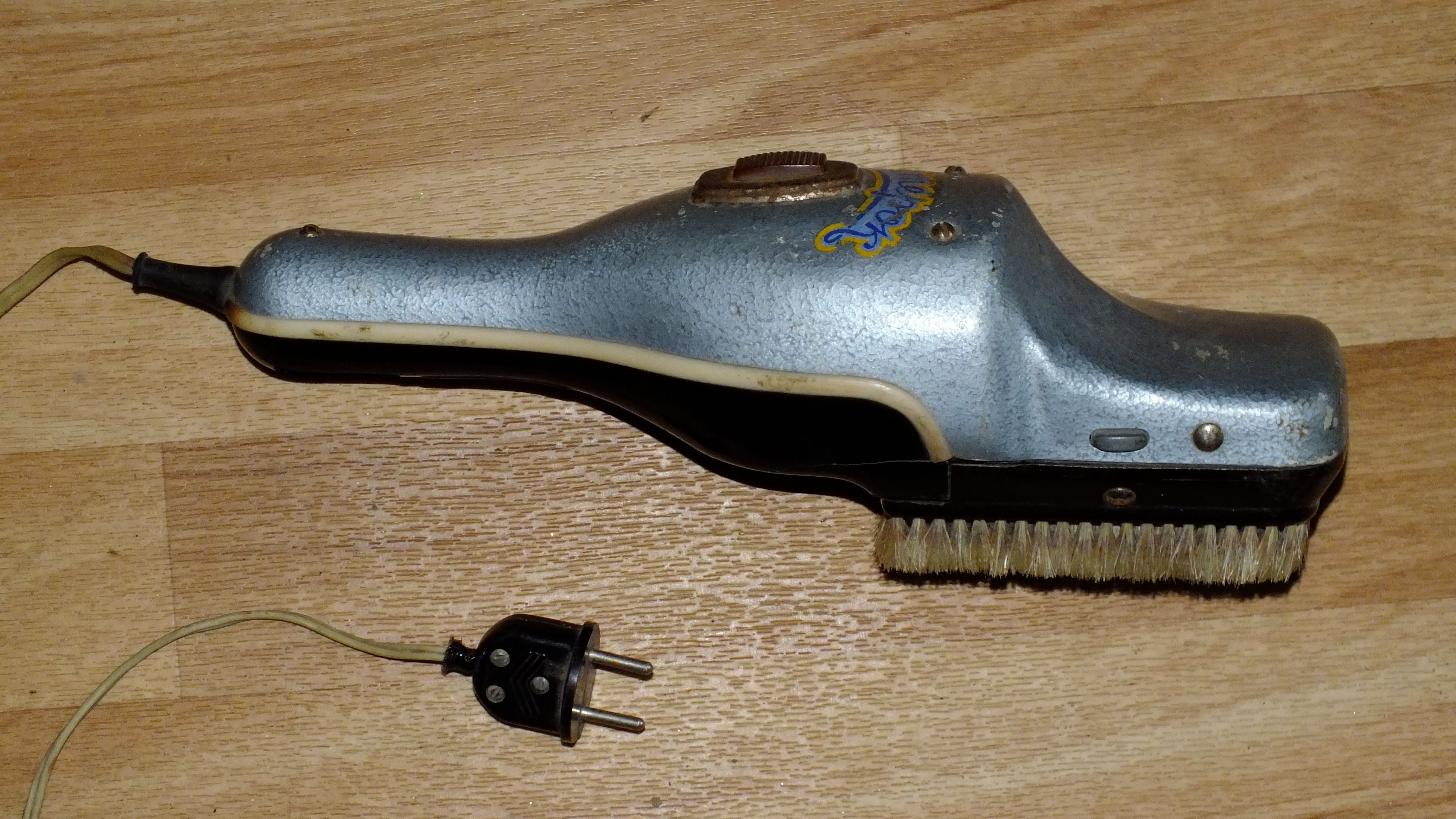 Пылесос-щетка Ветерок СССР 1970-е годы